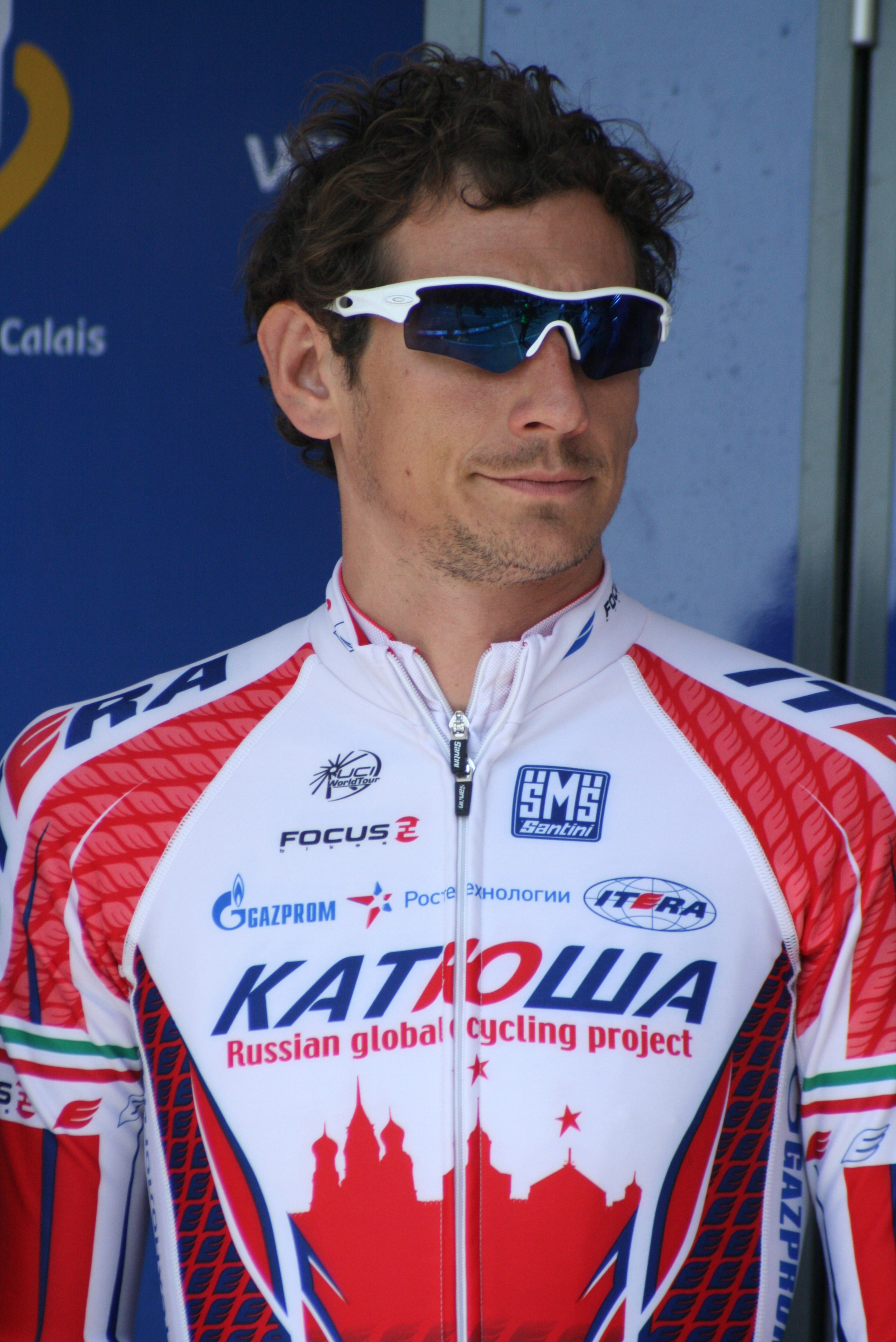 Présentation des coureurs au départ de la première étape Filippo Pozzato